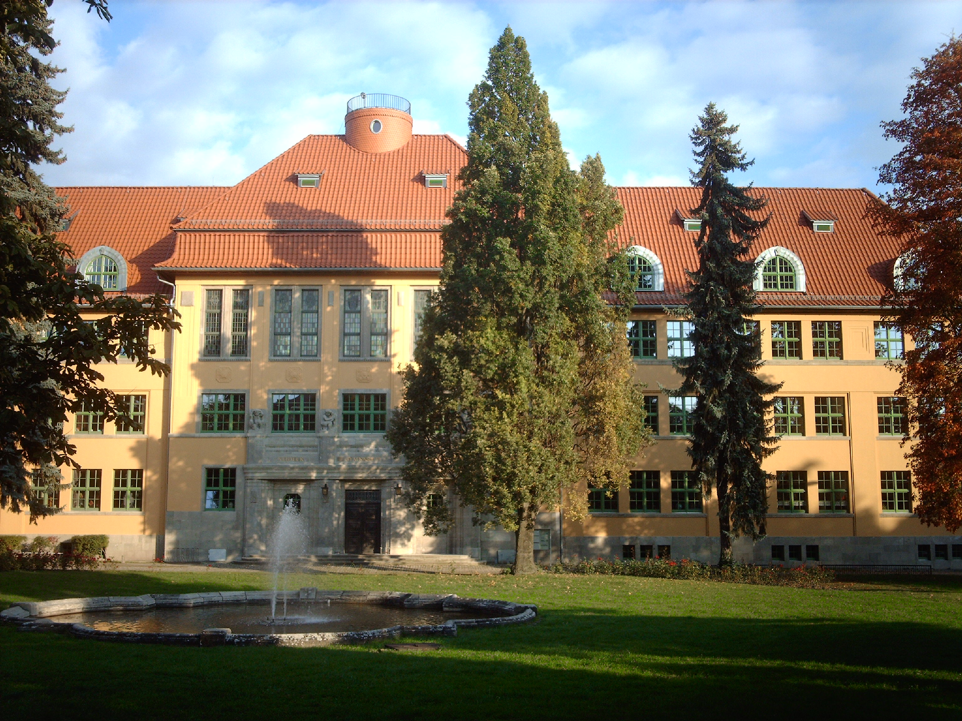 Ehemaliges Neideck-Gymnasium in Arnstadt.